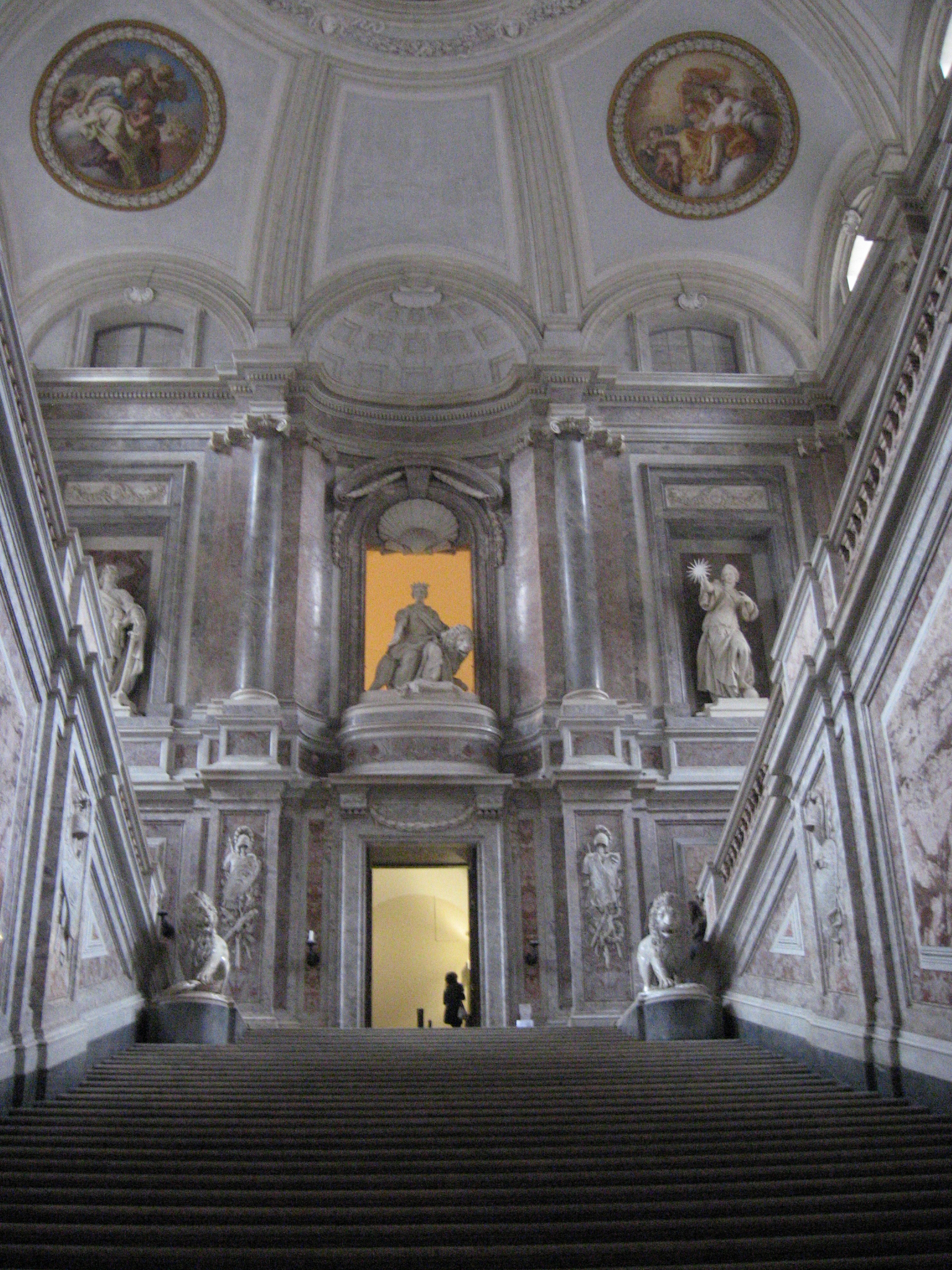 Díszlépcső